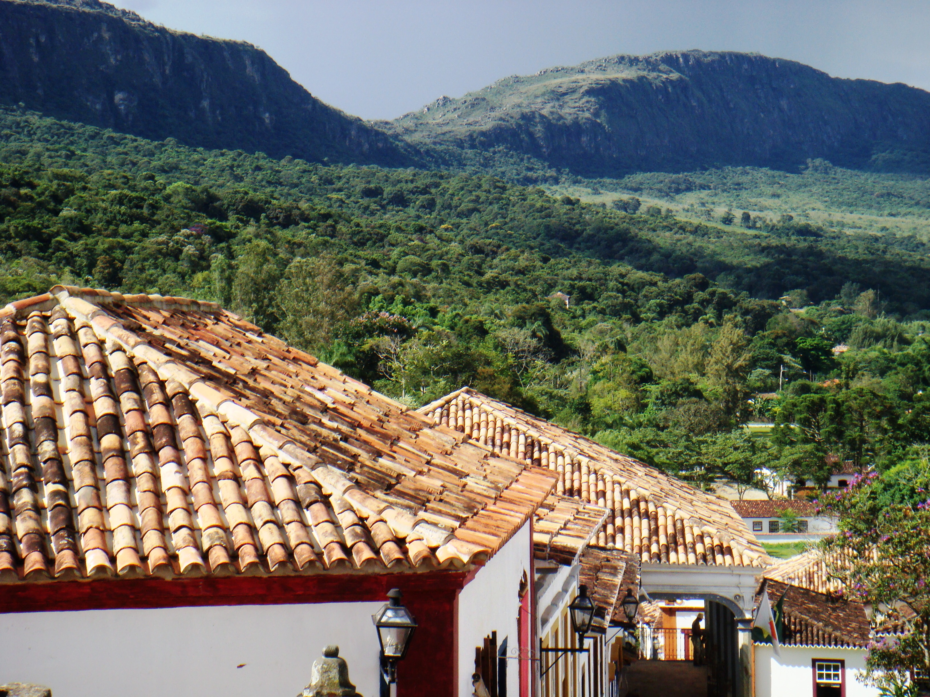 Serra de São José - Tiradentes - MG - Brasil